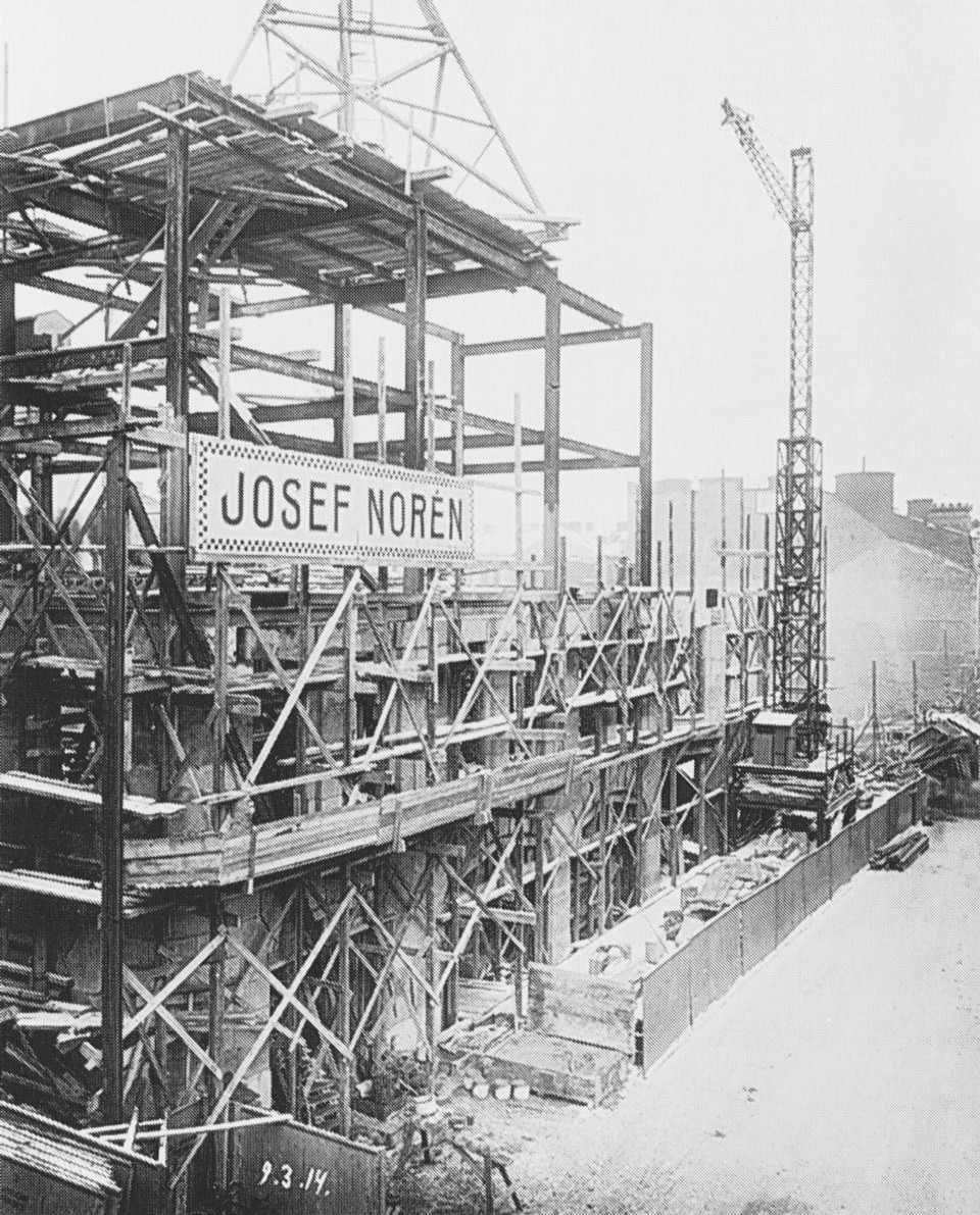 Stålstommen för NK under uppförande